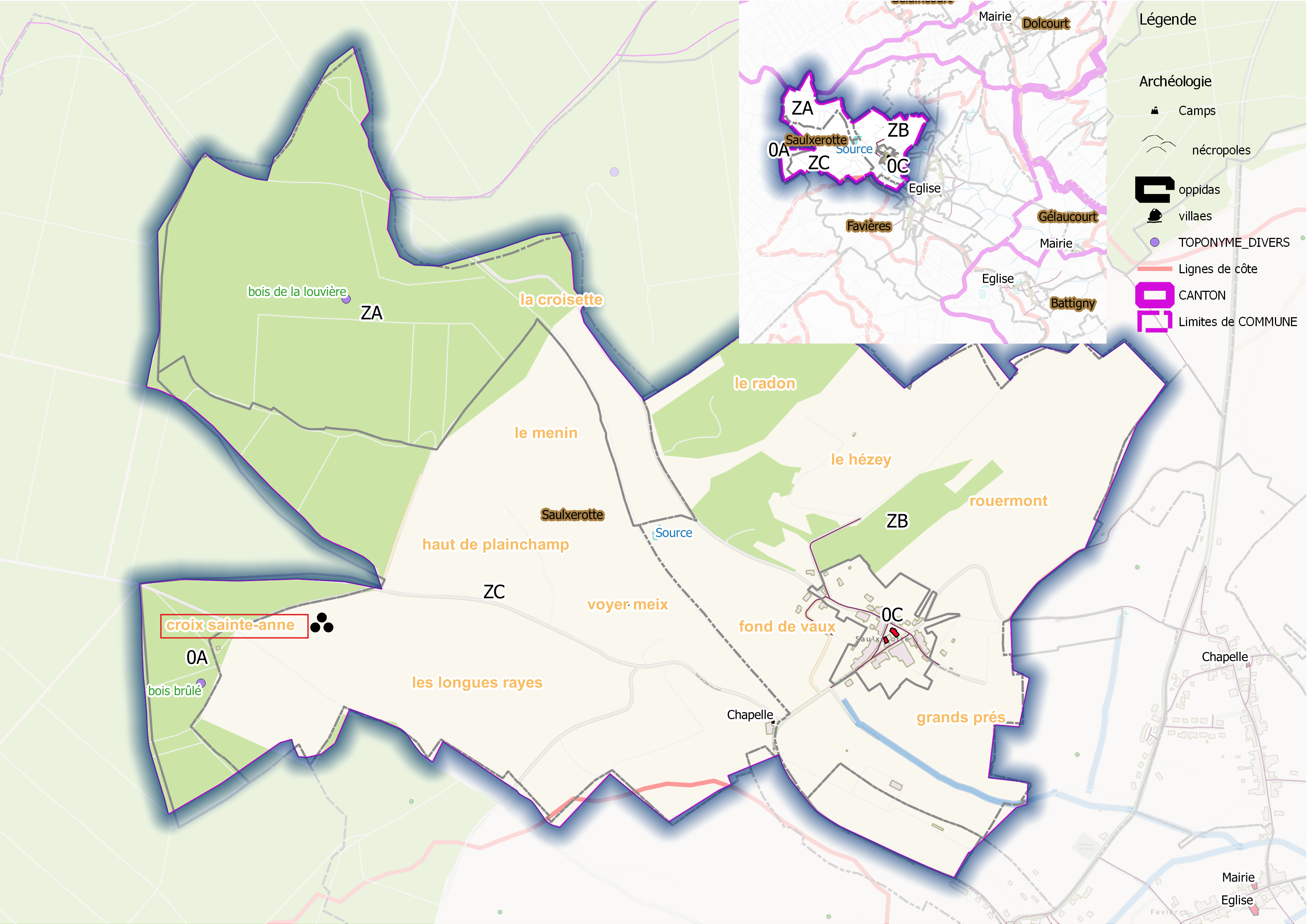 Saulxerotte (ban communal) OSM et Qgis, encart de localisation de l'enclave